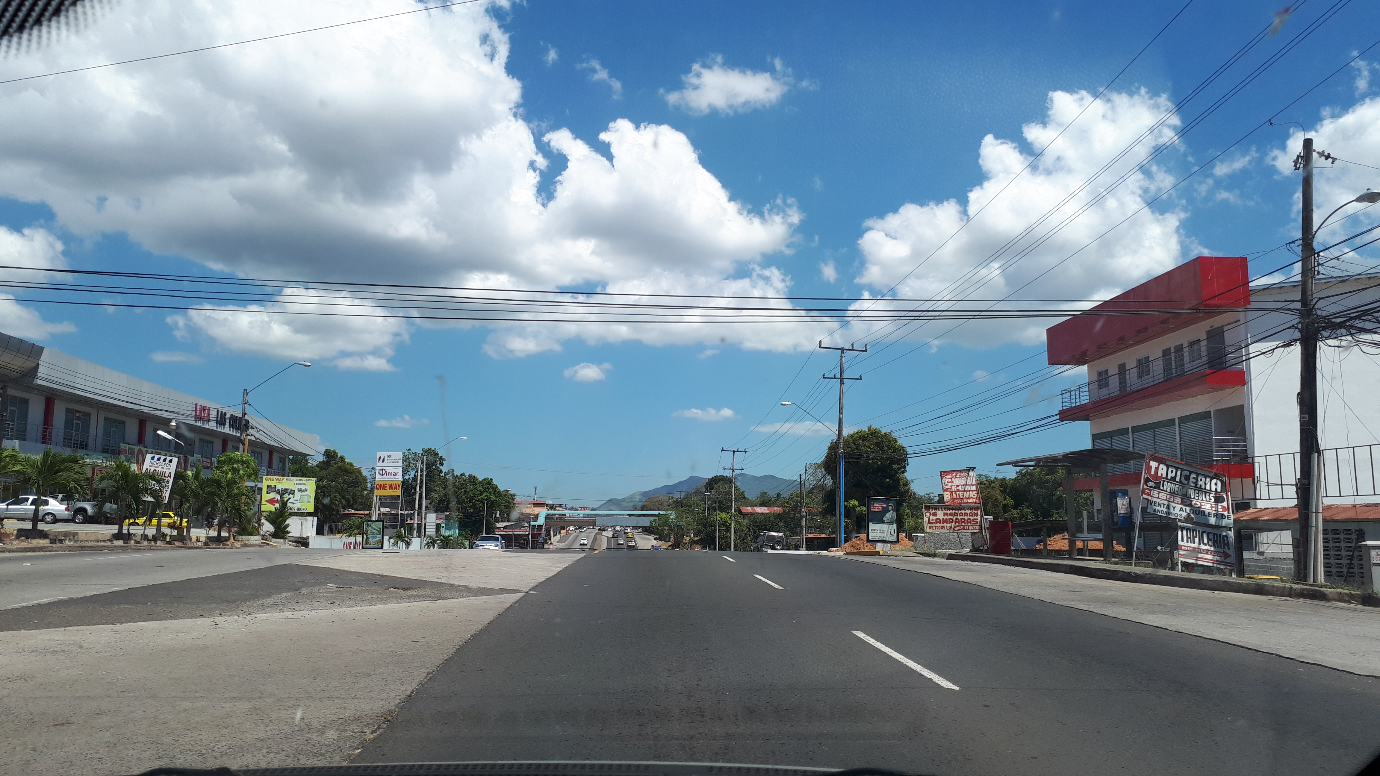 Toma de la Carretera Panamericana a la altura de Nuevo Arraiján, con el Cerro Cabra en segundo plano